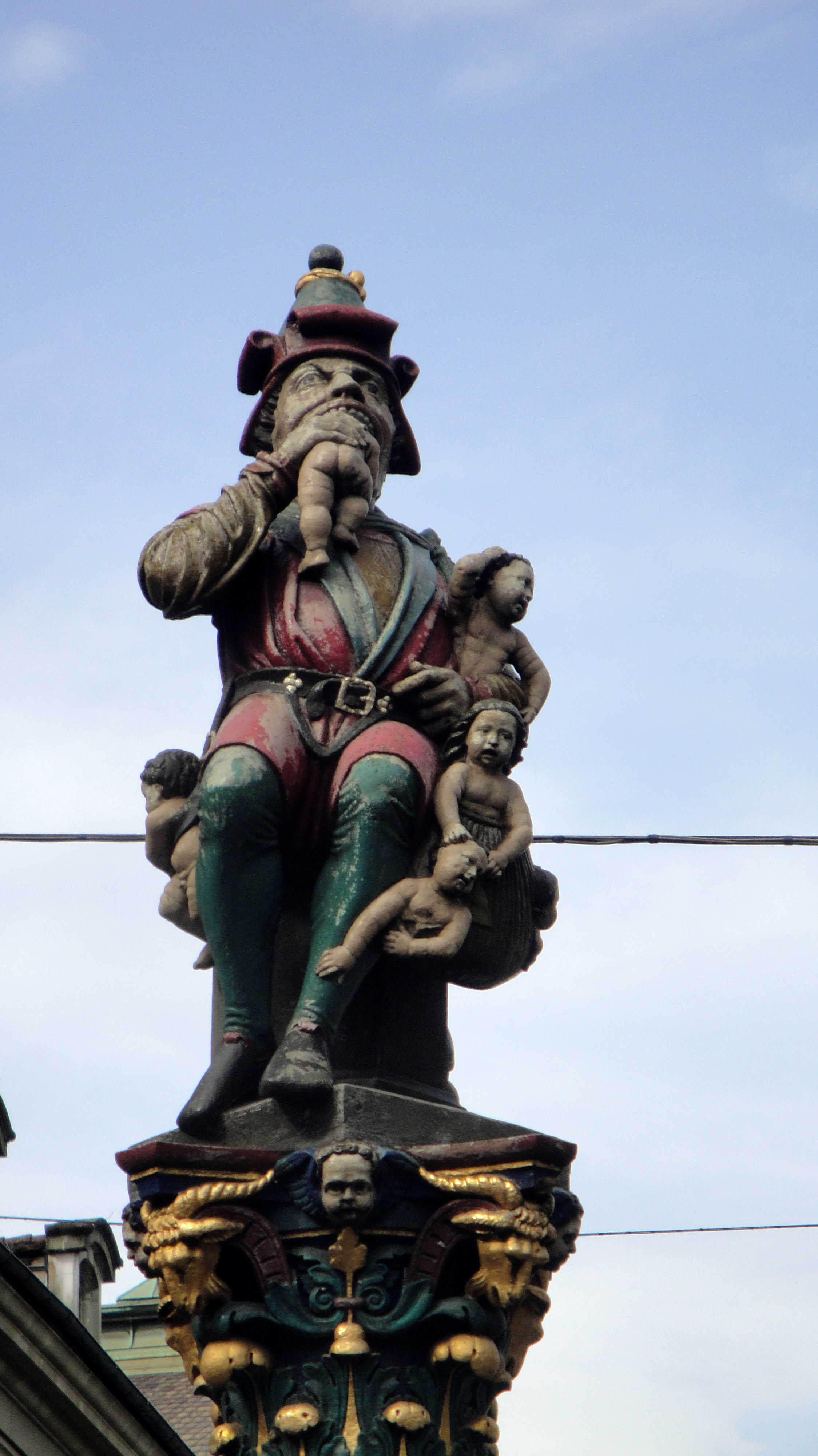 Bern, Kindlifresserbrunnen